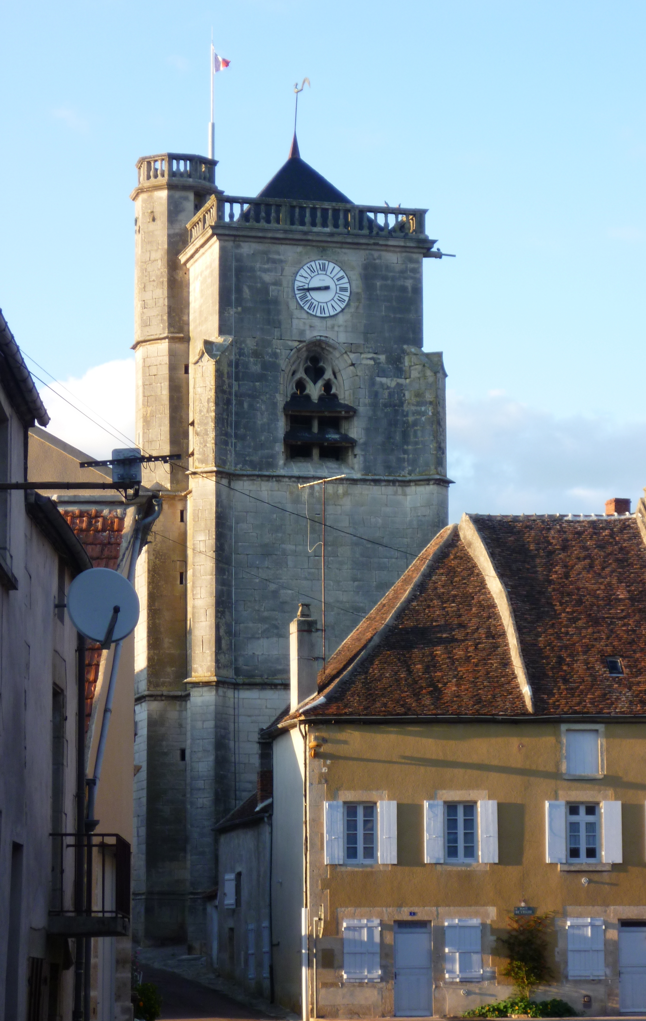 Vue depuis la rue du Commerce